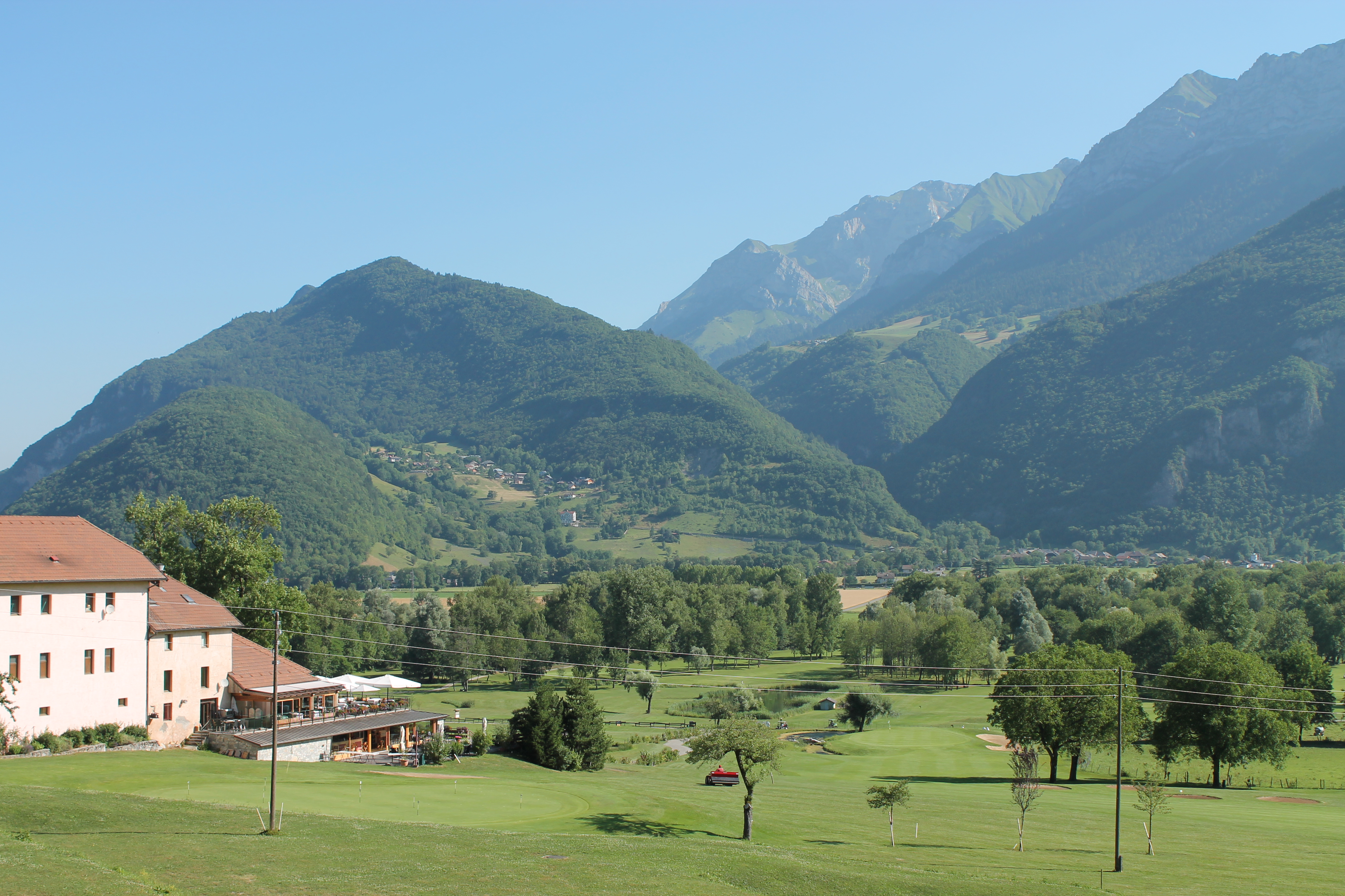 Club House du Golf de Giez (à gauche). En arrière plan, le hameau et le Mont Bogon (à gauche), au centre Plan Montmin, et à droite le massif des Bornes